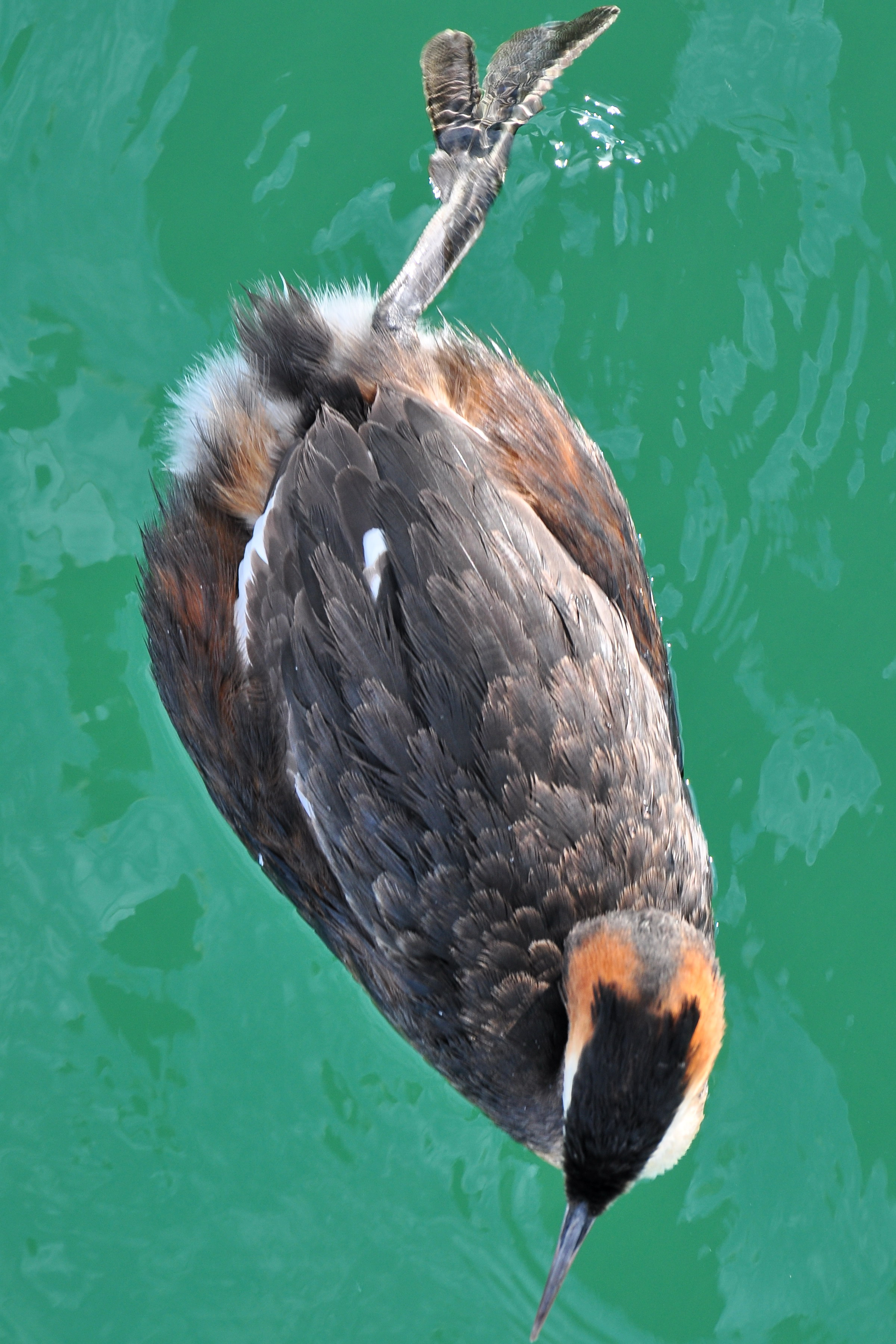 Podiceps cristatus on Obersee (upper Lake Zürich) respectively Seedamm and the wooden bridge (Holzbrücke) between Hurden and Rapperswil in Switzerland